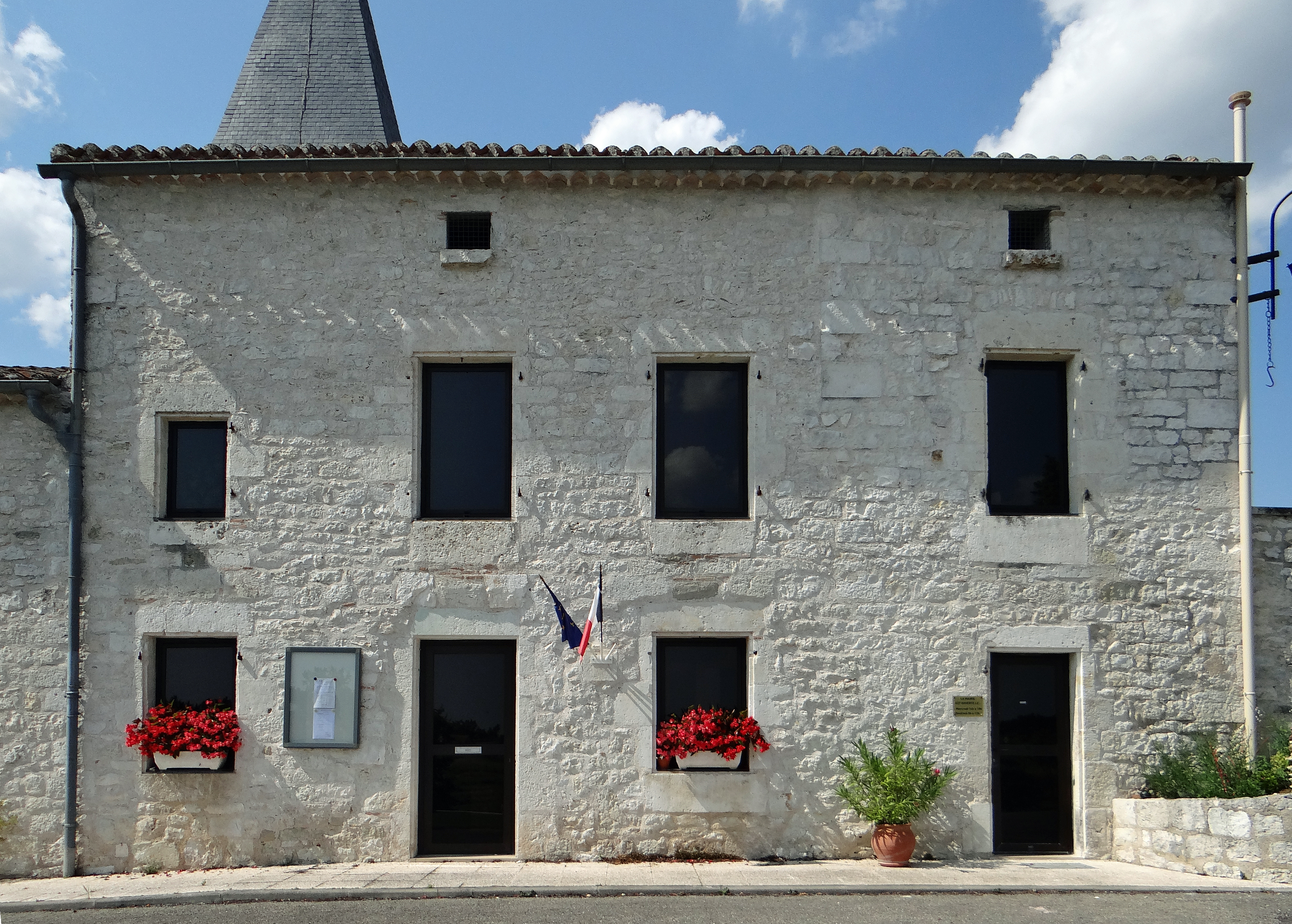 Saint-Amans-de-Pellagal - Mairie